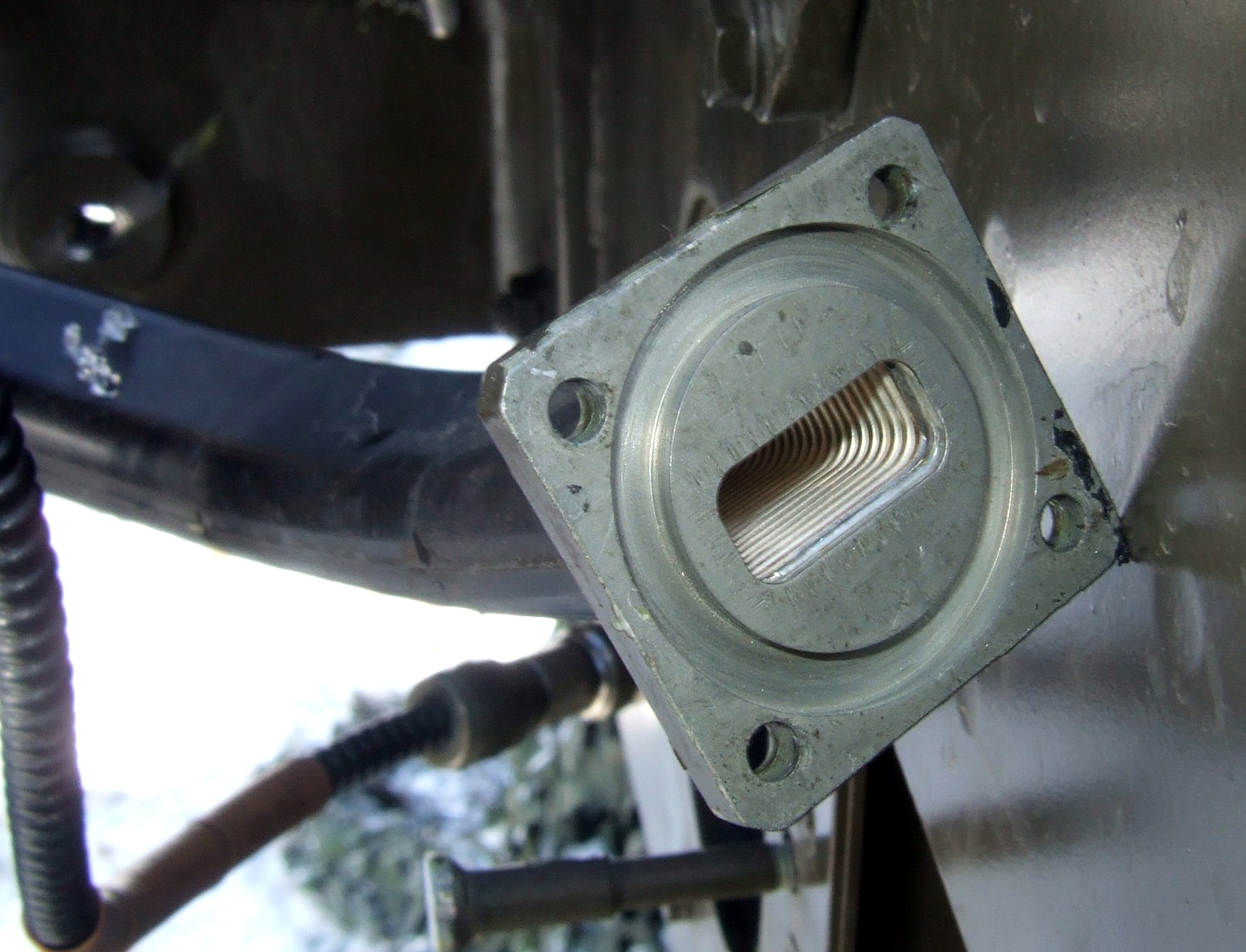 Waveguide J-Band Radar